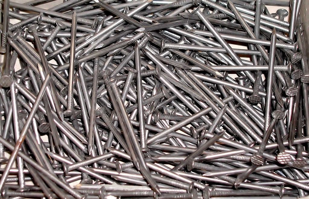 Nails.